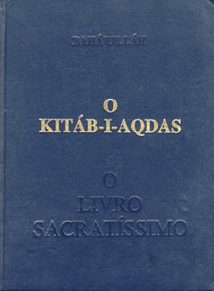 Capa do Livro Aqdas (Kitáb-í-aqdas)